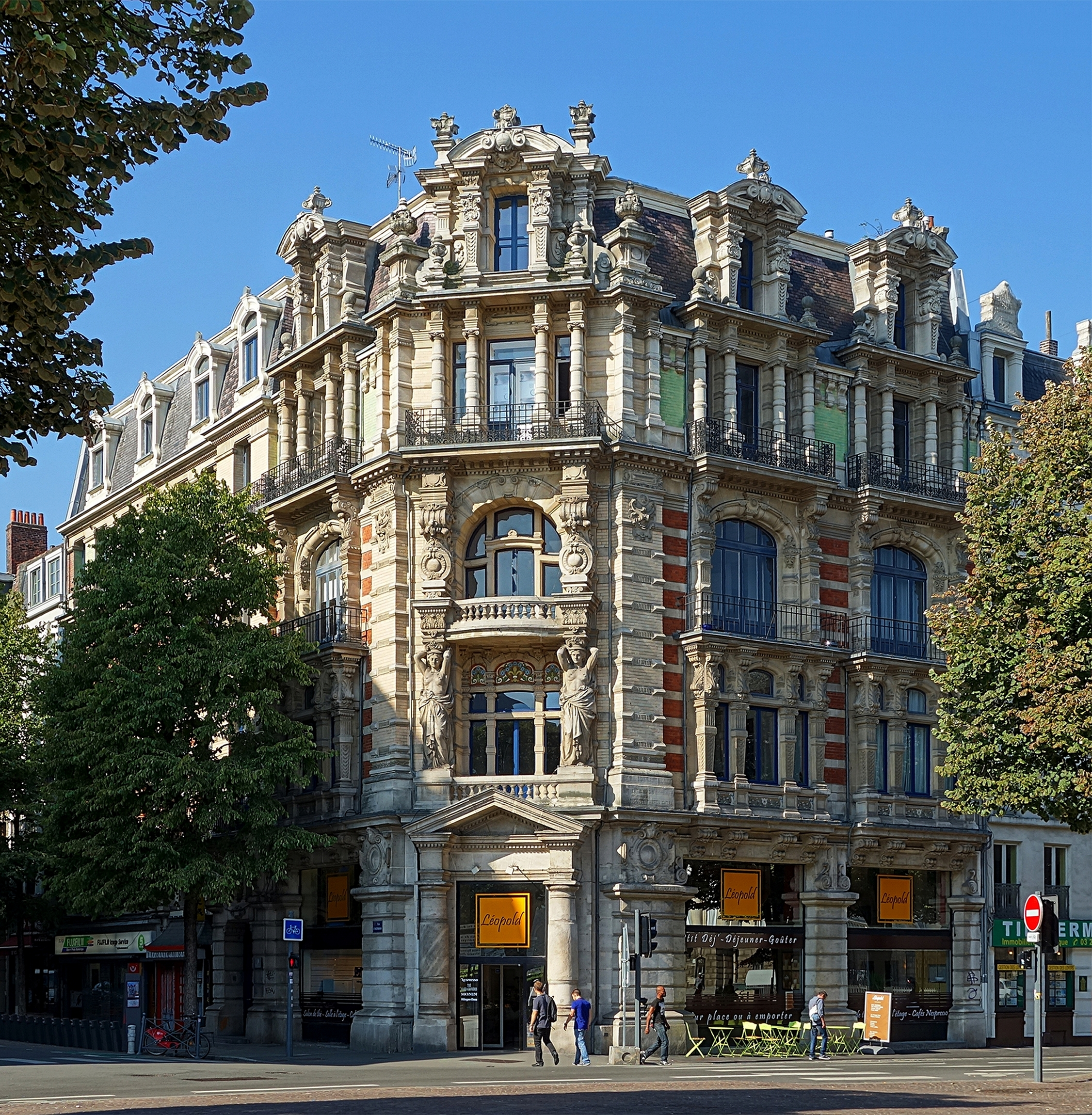 Hôtel des Cariatides (Inscrit) à Lille.